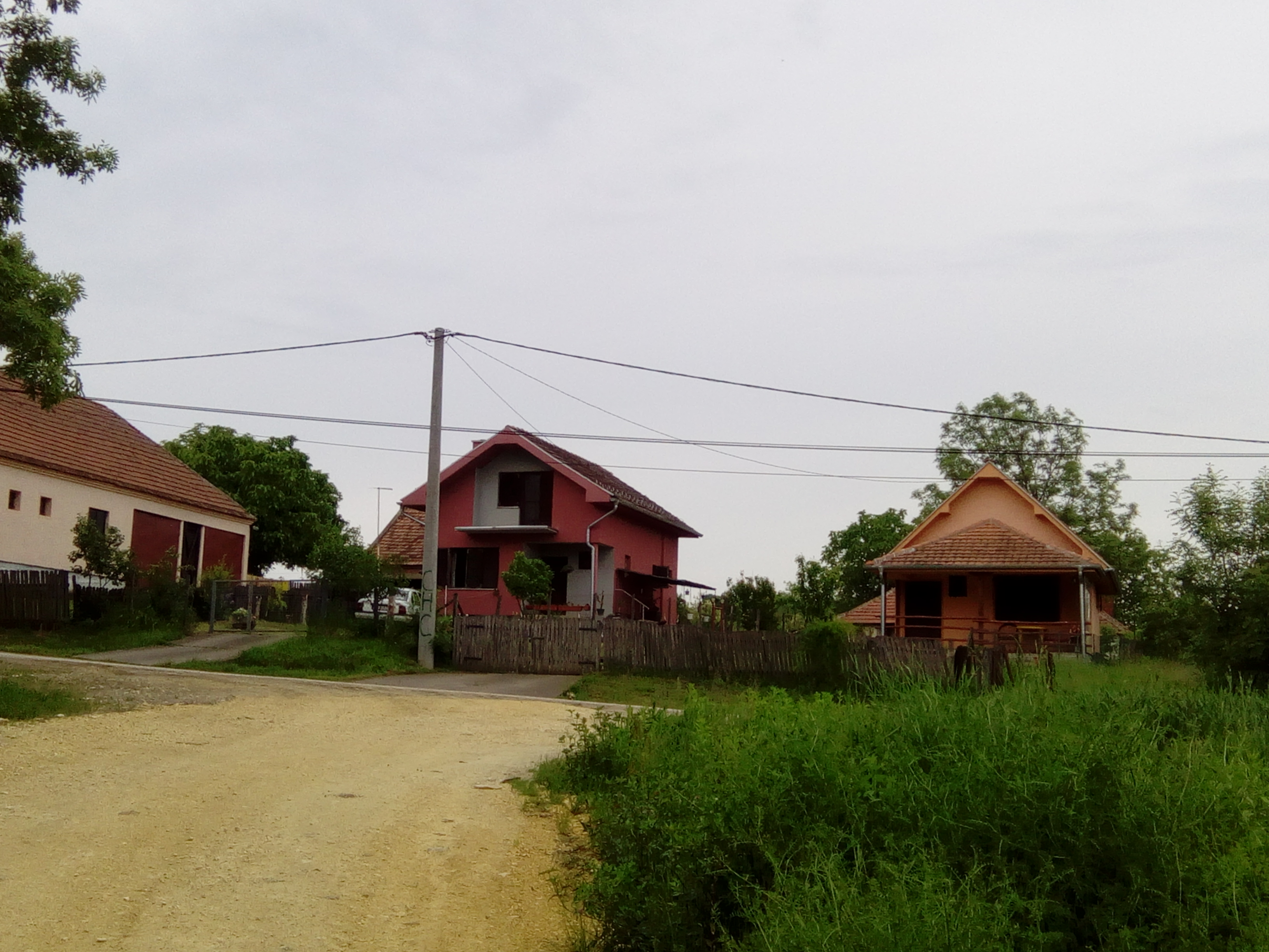 Srpski (latinica): Sipić, naseljeno mesto u opštini Rača